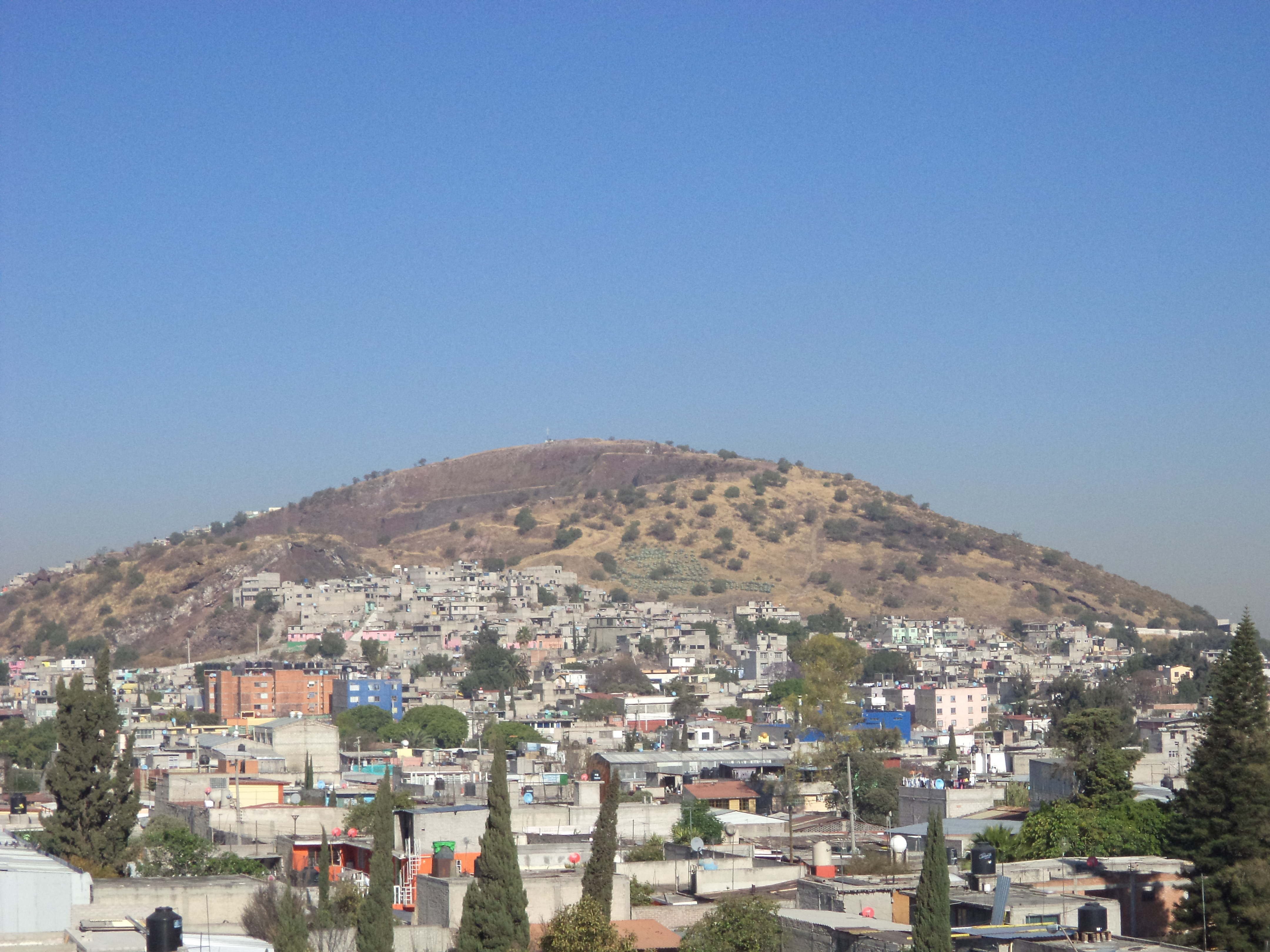 Cerro Peñon Viejo